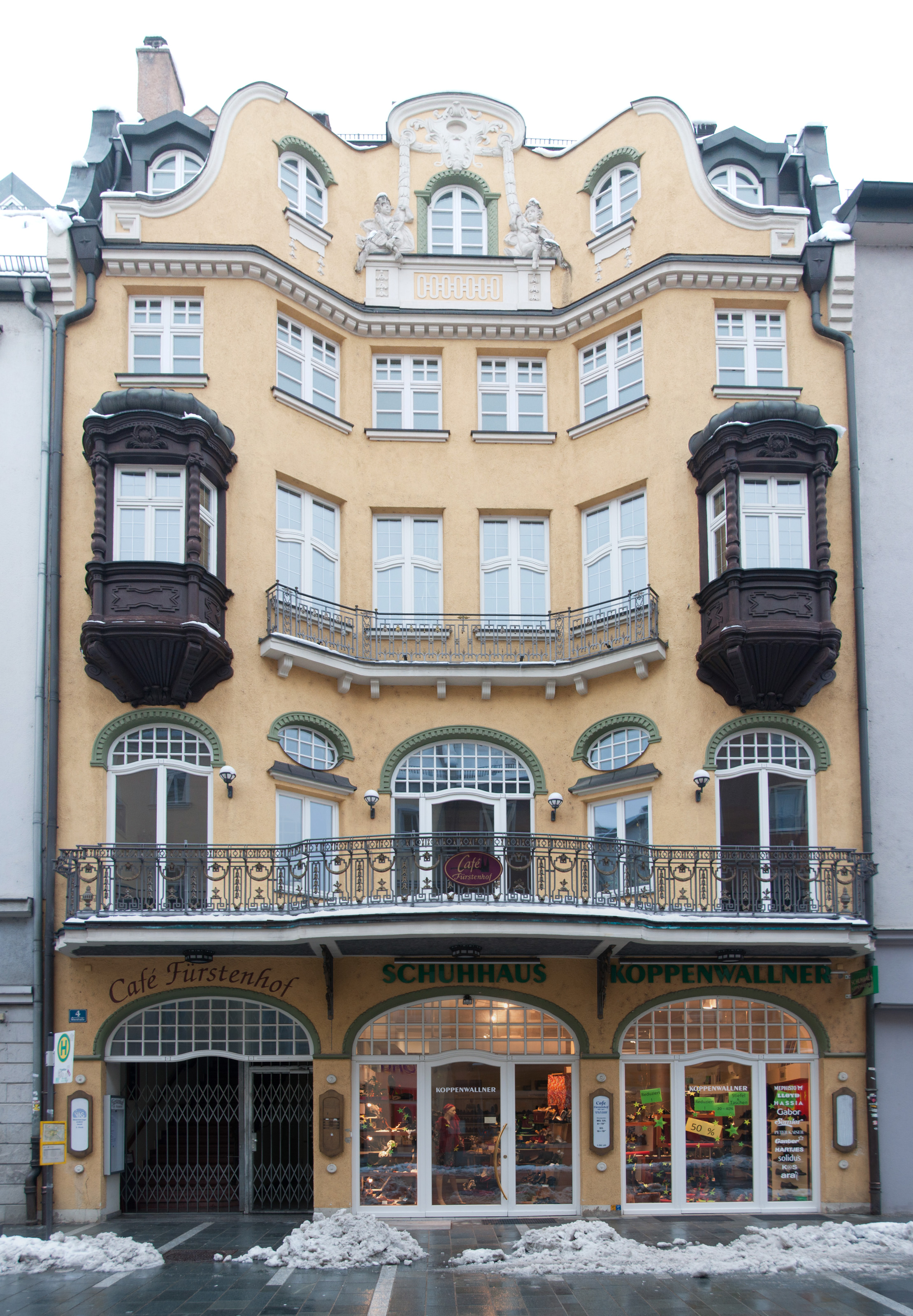 Fassade des Café Fürstenhof, viergeschossiger und giebelständiger Mansarddachbau im barockisierenden Jugendstil, mit im Mittelteil eingezogener Fassade und geschweiftem Zwerchgiebel, gegliedert durch Erker und schmiedeeiserne Balkongitter, 1911 von Joseph Koch und Franz Spiegel.This is a photograph of an architectural monument.